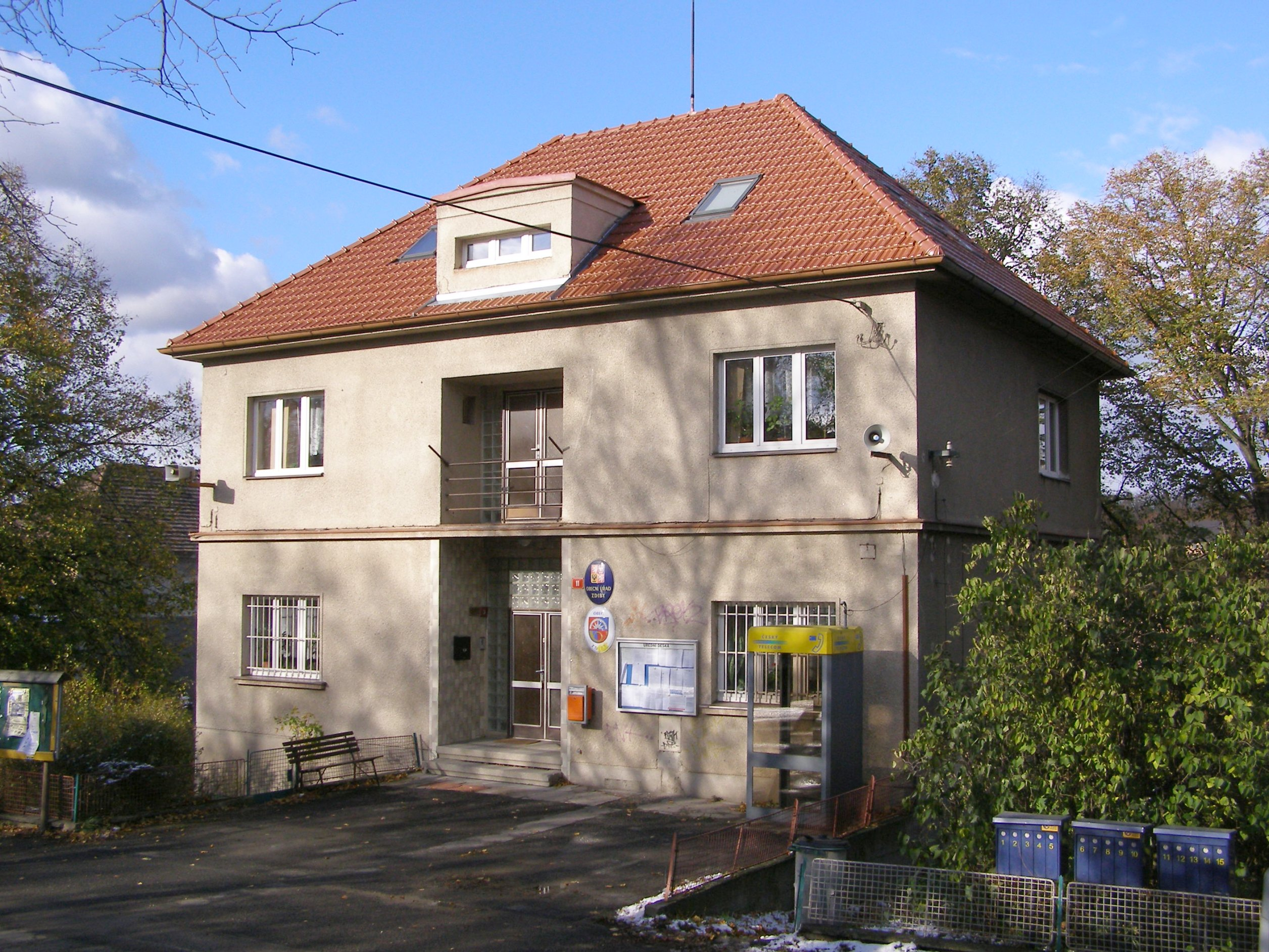 Obecni urad Zdiby